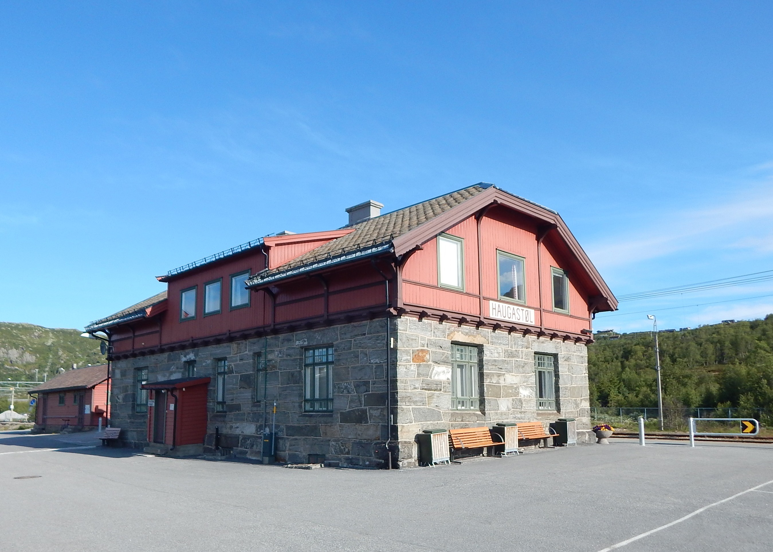 Haugastøl stasjon